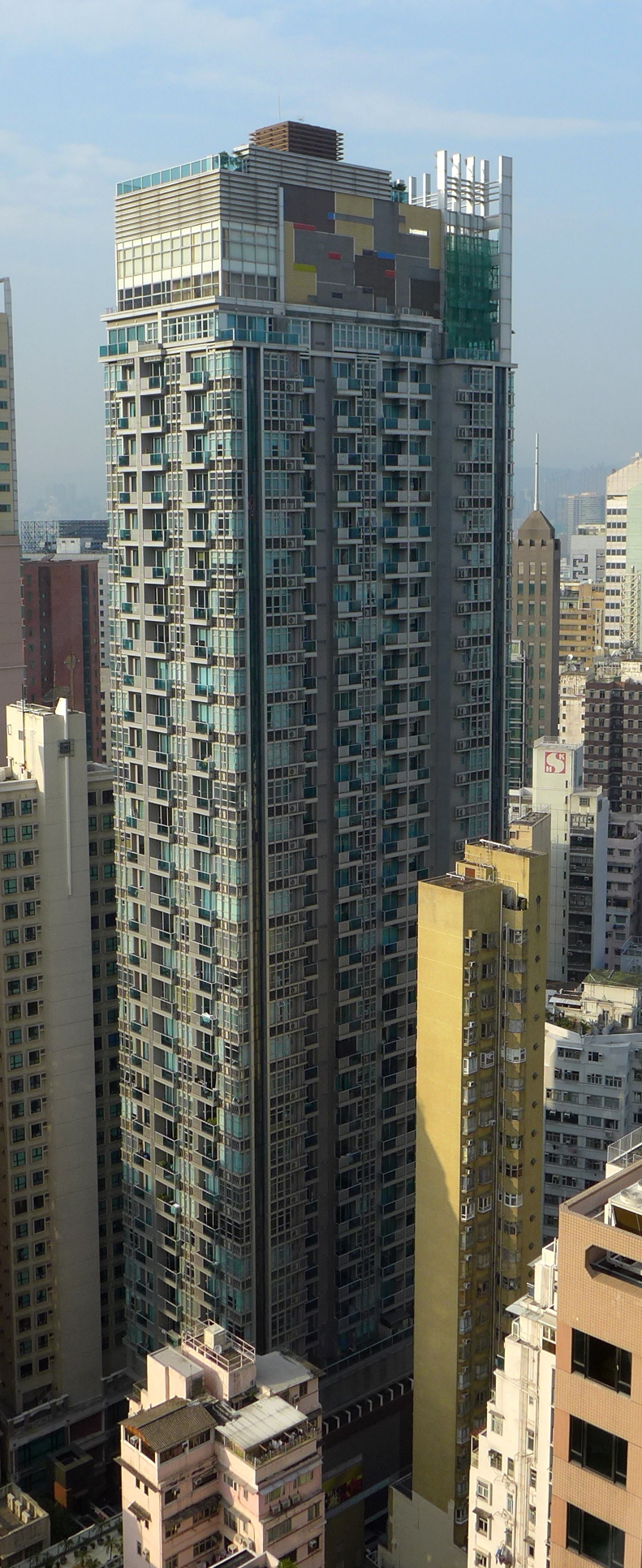 J Residence